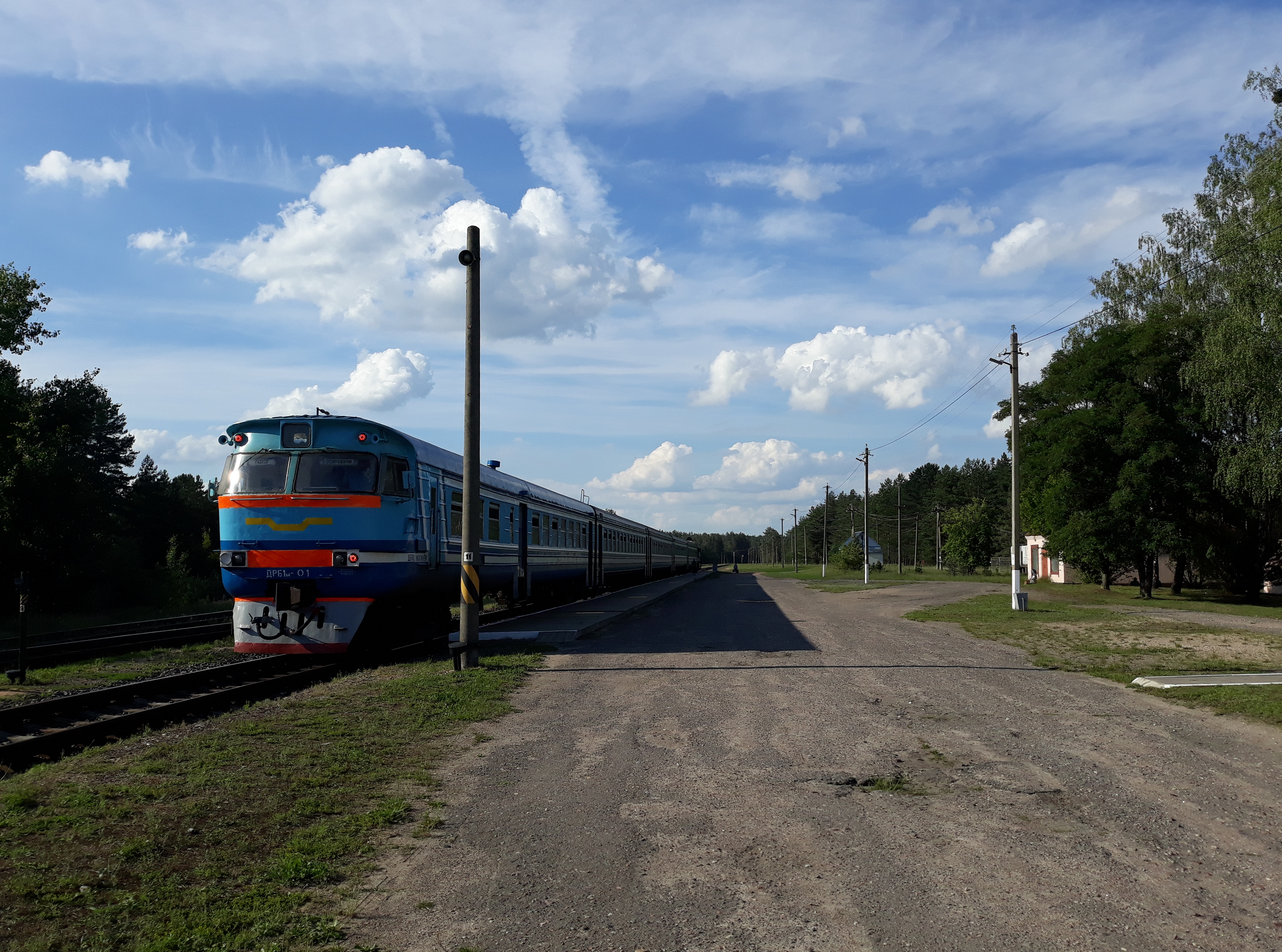 Цягнік ДРБ1м -01 на маршруце Асіповічы - Рабкор, на станцыі Рабкор